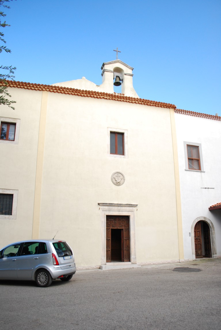 Chiesa e complesso conventuale di Santa Maria degli Angeli This is a photo of a monument which is part of cultural heritage of Italy.